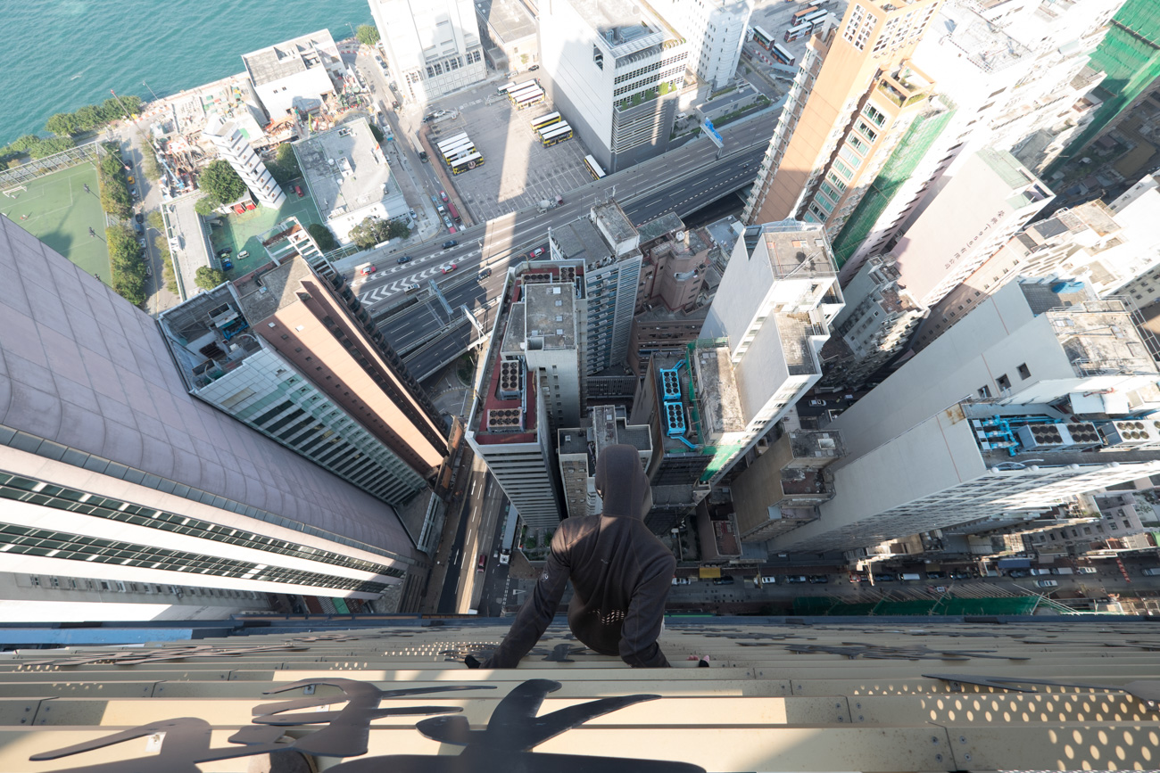 Rooftopping on a roof in Hong Kng